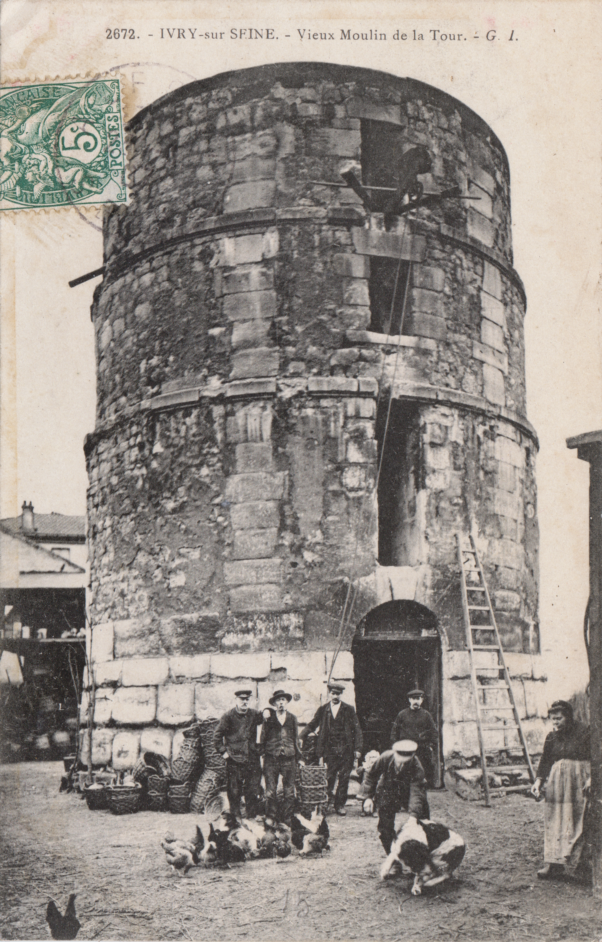 Le moulin de la tour à Ivry-sur-Seine au début du XXe.